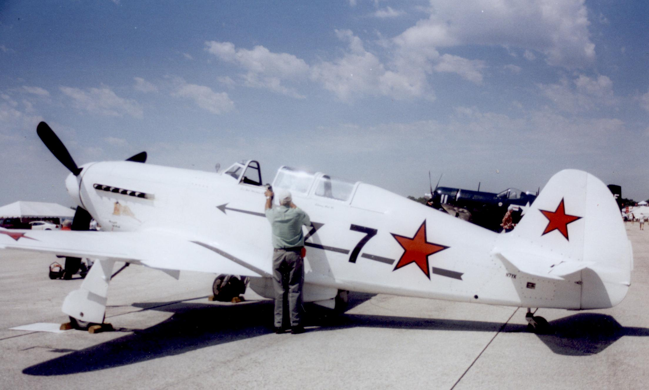 Yakovlev Yak-11 modified to Yakovlev Yak-7 outline, at Lakeland Florida